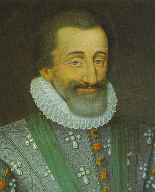 Henri IV de France, Henry IV of France